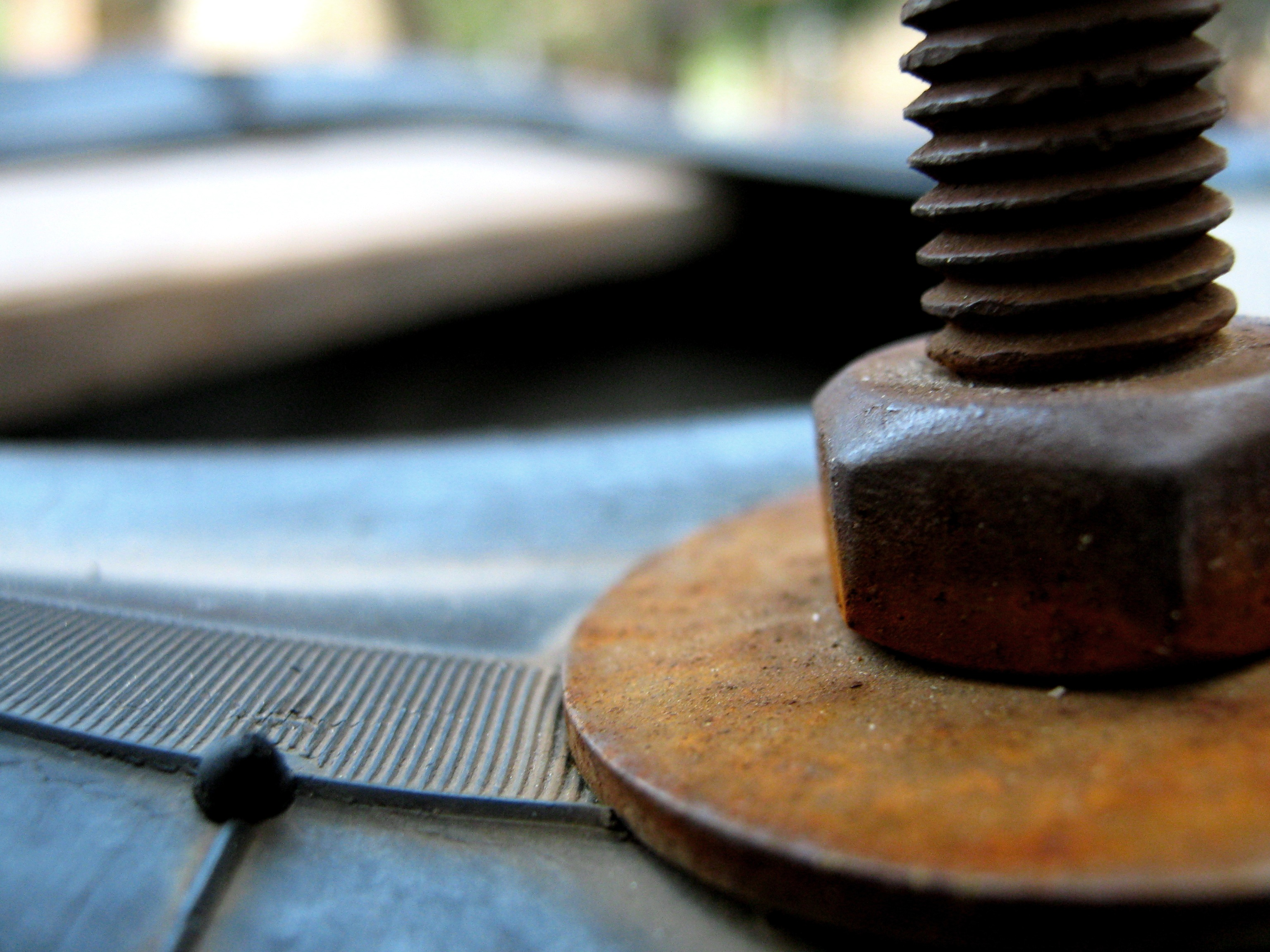 Los tornillos se oxidan cuando pasa mucho tiempo.